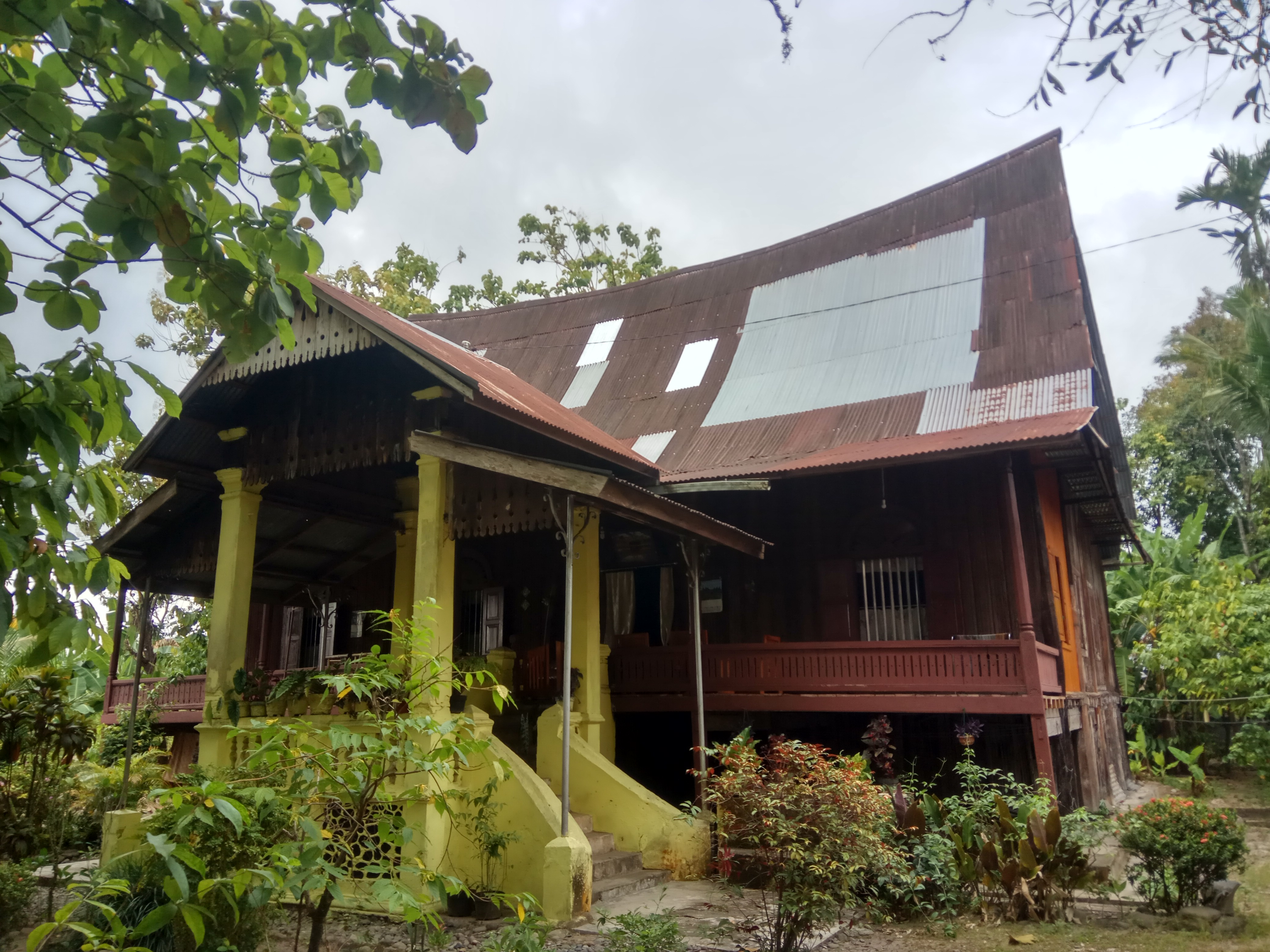 Sebuah rumah kajang padati di Koto Tangah